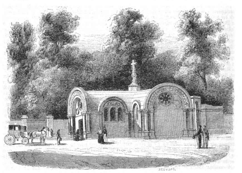 Die Capelle des heiligen Ferdinand in Sablonville bei Paris